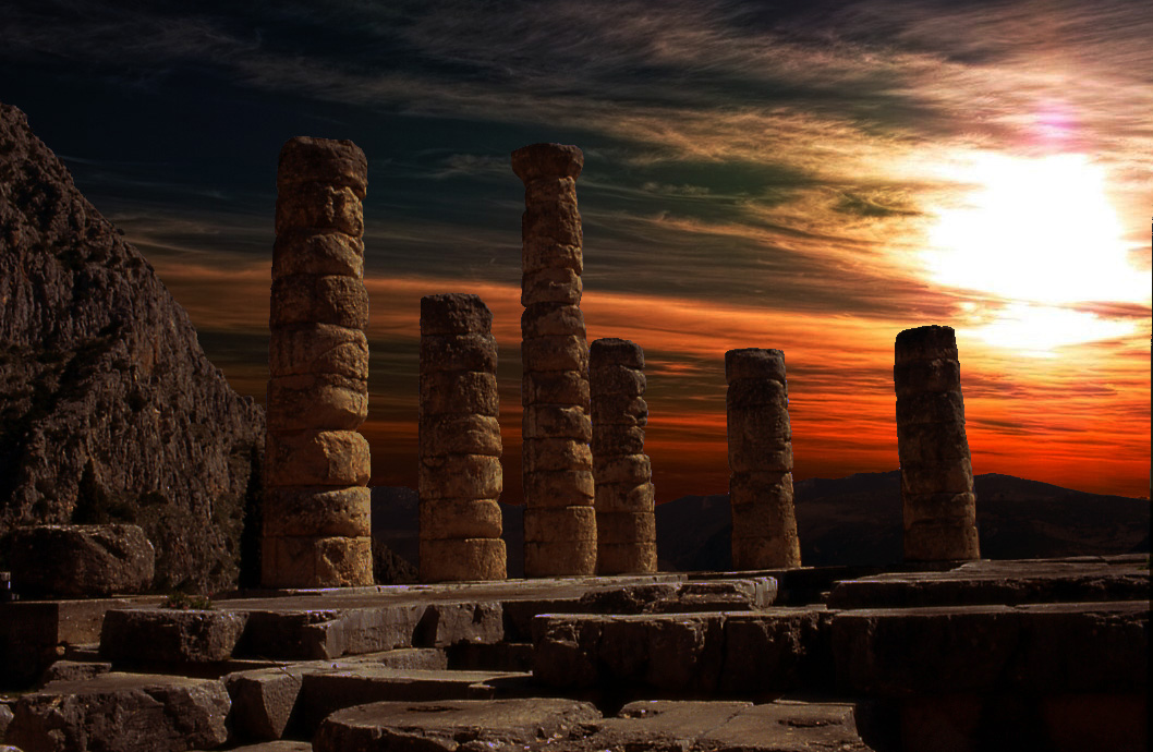 Ο ναός του Απόλλωνα κατασκευάστηκε το 510 π.Χ. με χρήματα που συγκεντρώθηκαν από ελληνικές πόλεις, με μέριμνα των Αλκμεωνιδών της Αθήνας. Όταν ο ναός αυτός καταστράφηκε το 373 π.Χ. από σεισμό, οι ελληνικές πόλεις συγκέντρωσαν εκ νέου χρήματα και τον έκτισαν εκ νέου. Ολοκληρώθηκε γύρω στο 330 π.Χ.«Ναός του Απόλλωνα στους Δελφούς»